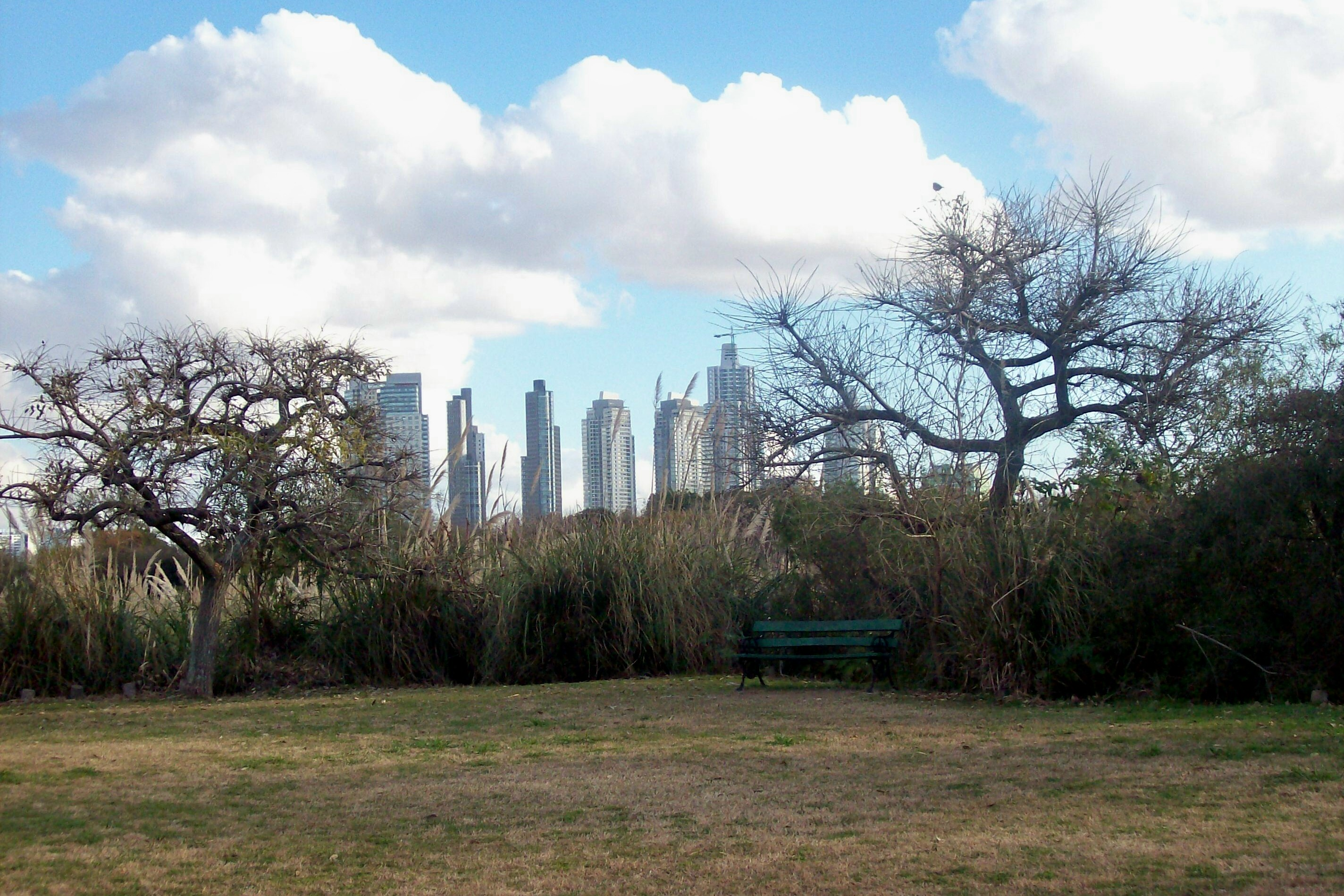 Rascacielos vistos desde la Reserva ecológica de Buenos Aires.